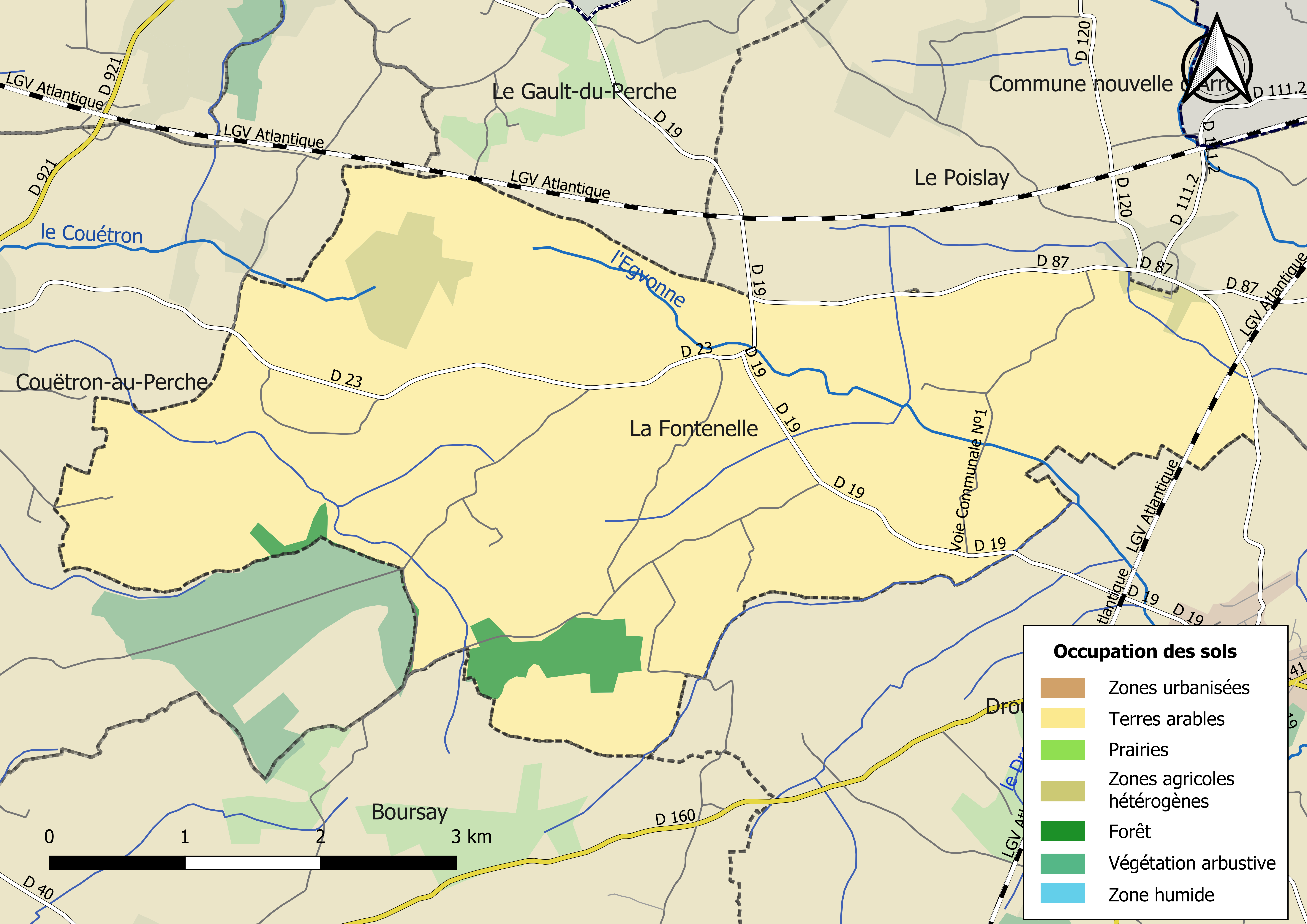 Carte des infrastructures et de l’occupation des sols en 2018 de la commune de La Fontenelle (Loir-et-Cher) (France).